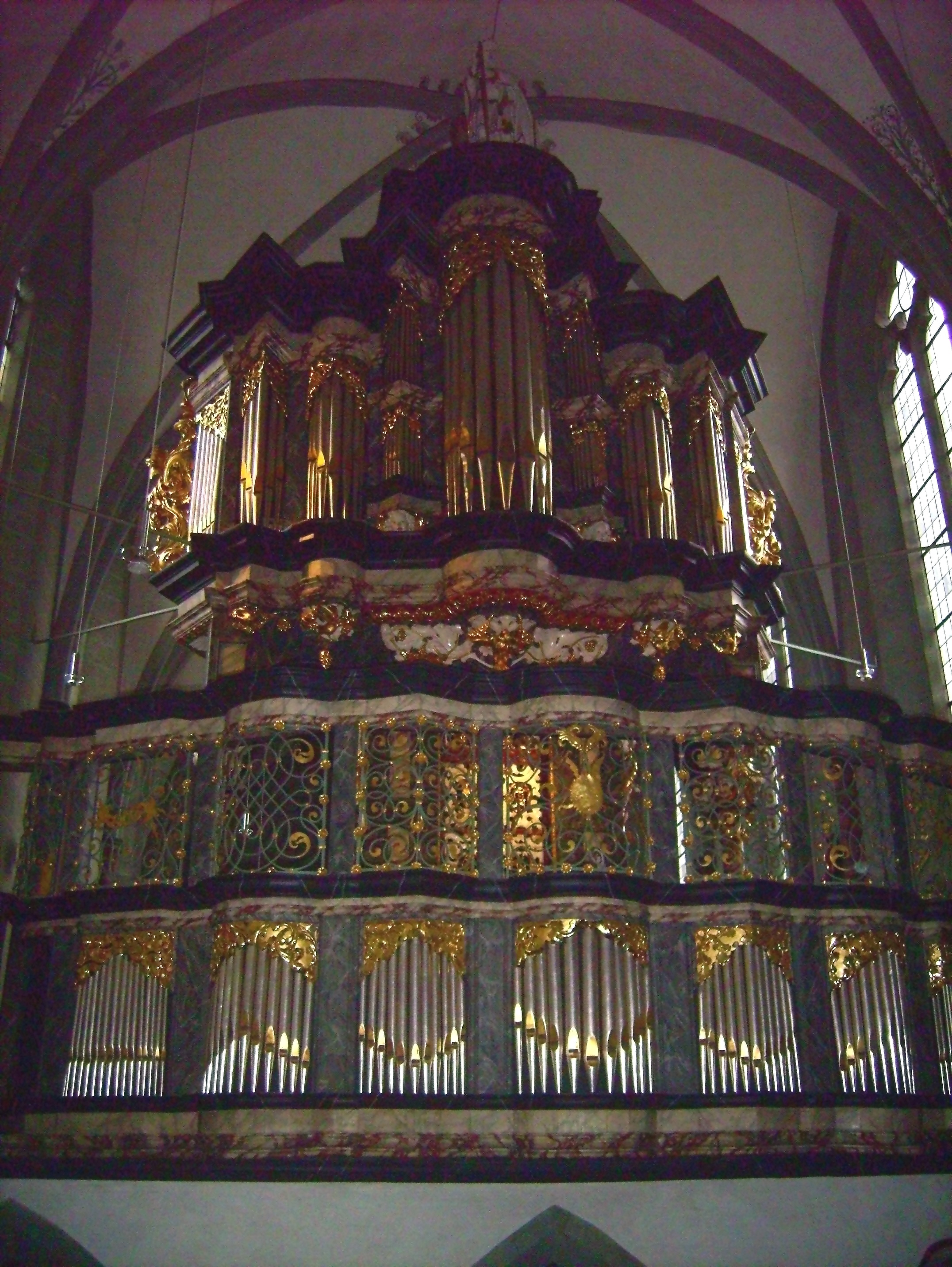 Kloster Oelinghausen - Orgel (barocker Umbau durch Johann Berenhard Klausing, Orgelprospekt von Wilhelm Splithofen)